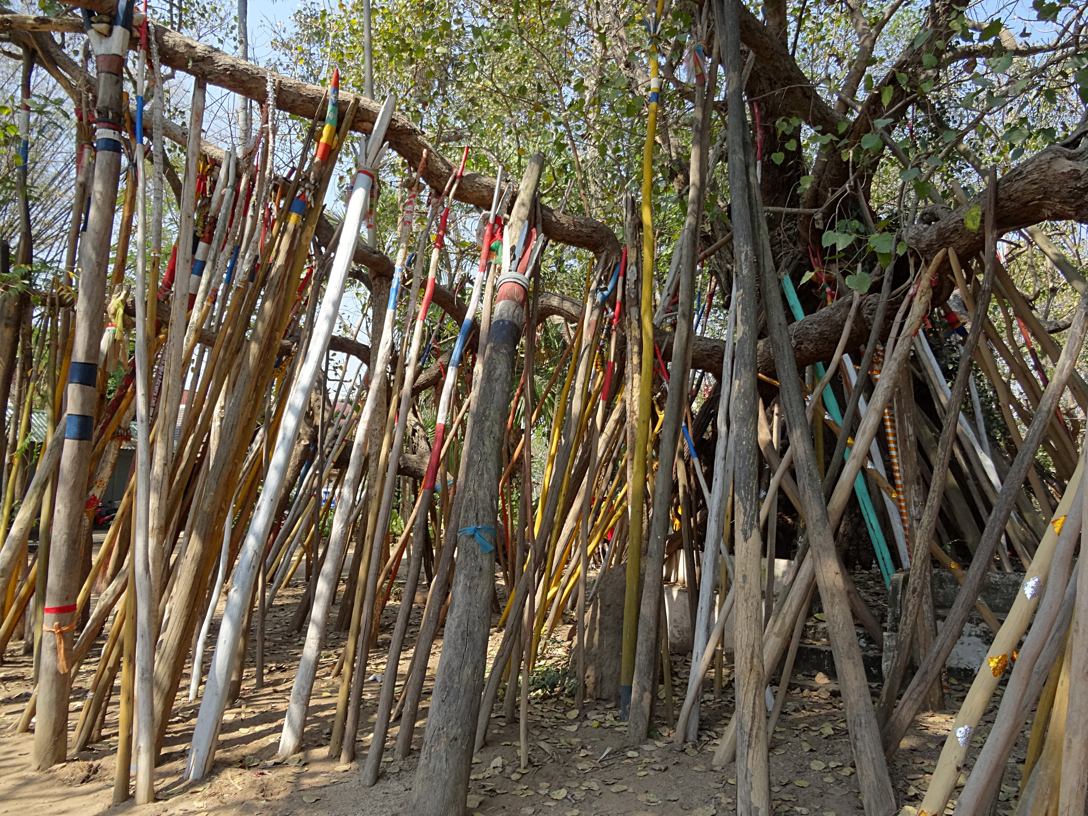 heiliger Bodhibaum mit unzähligen geschnitzten oder bemalten Stützpfählen im Wat Phrathat Lampang Luang